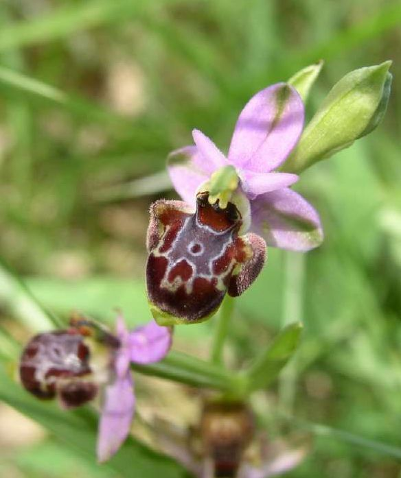 Ophrys holoserica syn. Ophrys fuciflora (Orchidaceae), dit « Ophrys bourdon » ; Orchidée sauvage (Massif des Maures, Var (France). Auteurs Jodelet/Lépinay